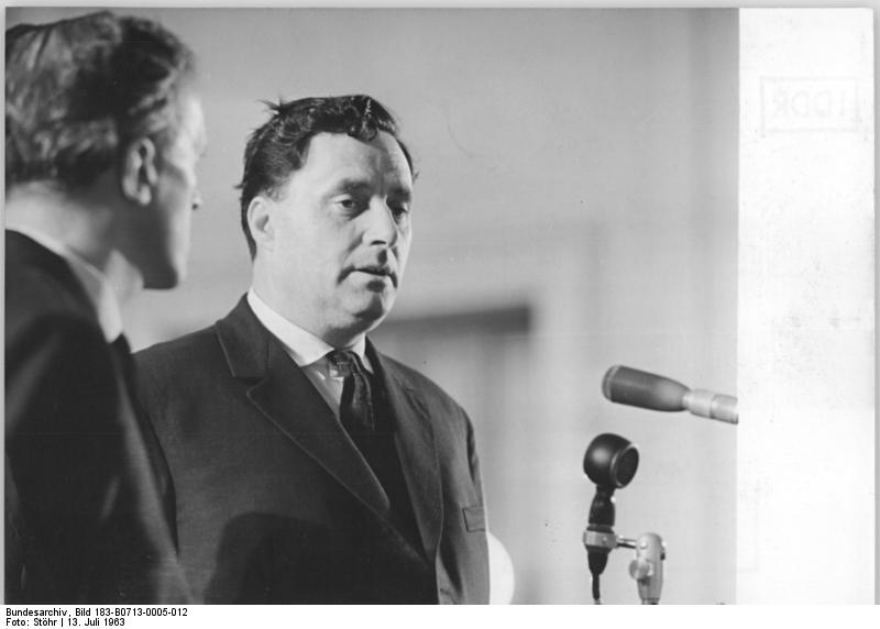 Oberstes Gericht, Globke-Prozess, Aussage, Augustinas Sawitzkas Zentralbild Stöhr-13.7.1963 6. Prozeßtag vor dem Obersten Gericht der DDR. Am 6. Prozeßtag des 1. Strafsenats des Obersten Gerichts der DDR gegen Globke am 13.7.1963 wurden die Germanisierungsverbrechen der Faschisten in den von ihnen okkupierten Ländern mit der Beweisaufnahme weiter verhandelt. Insbesondere wurden die Praktiken Globkes und seiner Komplizen in Polen erörtert. Außerdem kamen erstmals sowjetische Zeugen zu Wort. UBz: Der Bürger der litauischen SSR Augustinas Sawitzkas, ein Kunstmaler, rundete die Germanisierungsverbrechen mit den Aussagen über die Erschiessung seiner Angehörigen ab (rechts). Links: der Dolmetscher.